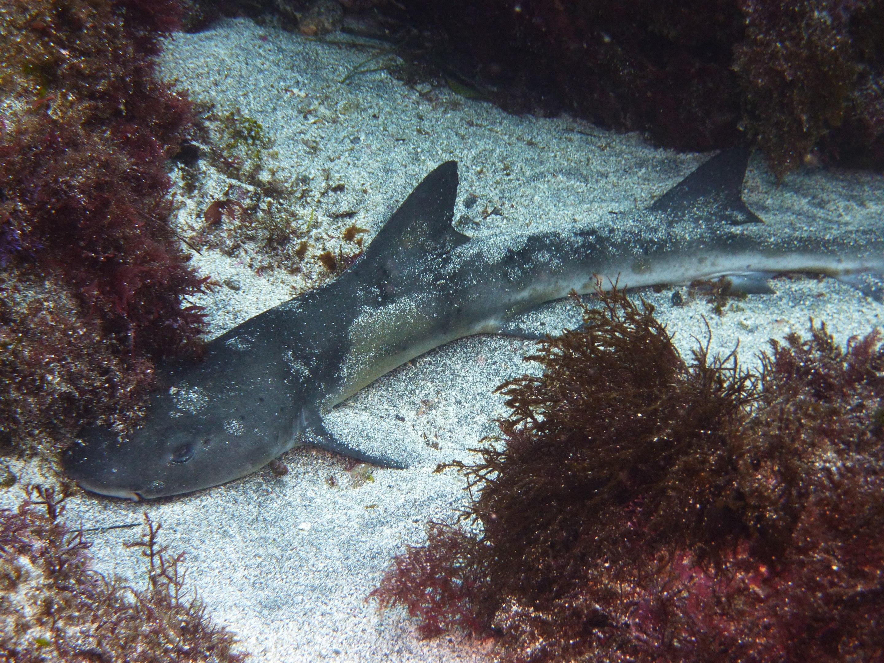 Japanese topeshark (Hemitriakis japanica)